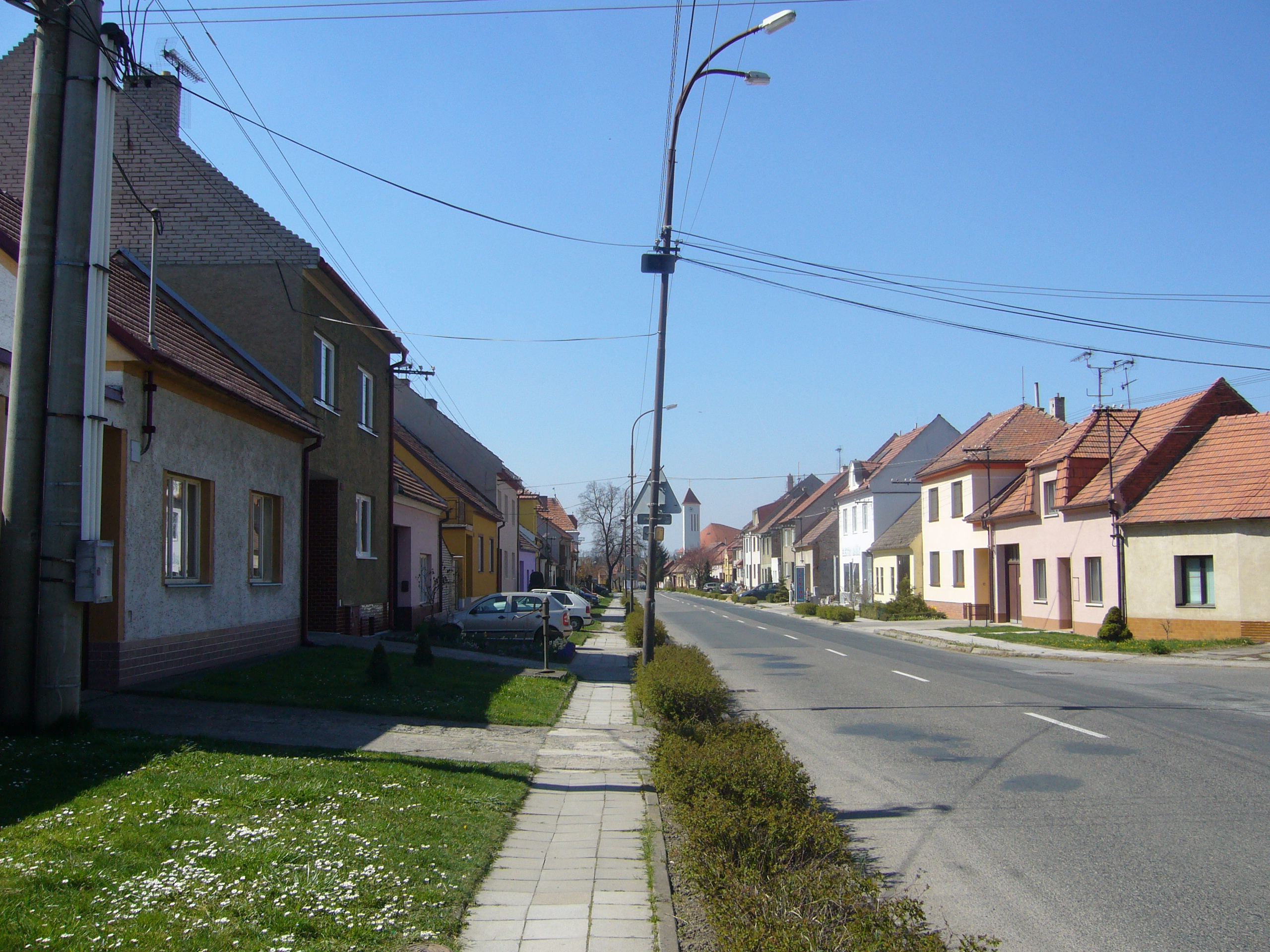 Hlavní ulice v obci, kterou prochází silnic I/71. Podél této komunikace je situována také většina zástavby. Díky tomu má obec typický protáhlý charakter.